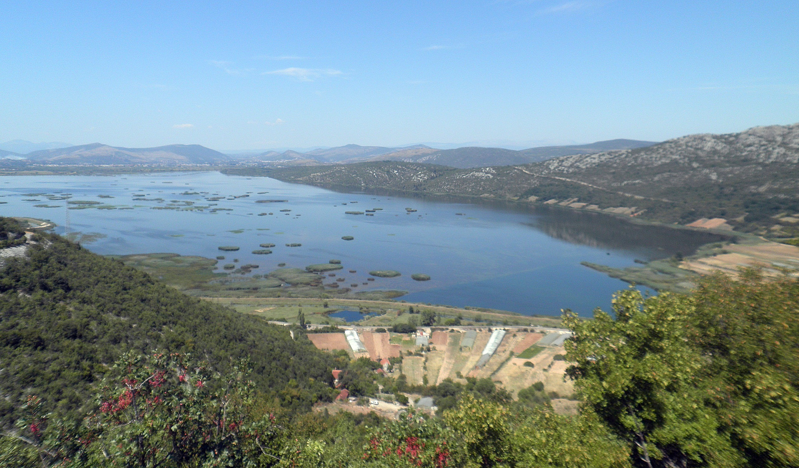 Svitavsko jezero / Hutovo blato